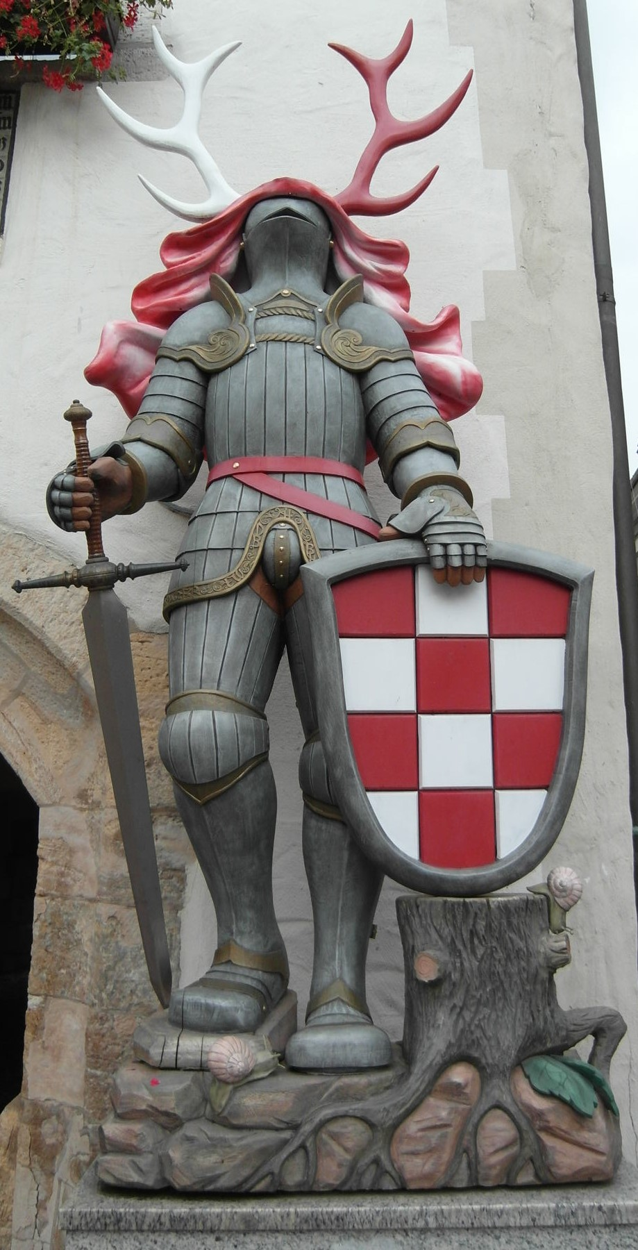 Bleicherode, Hölzerner Roland